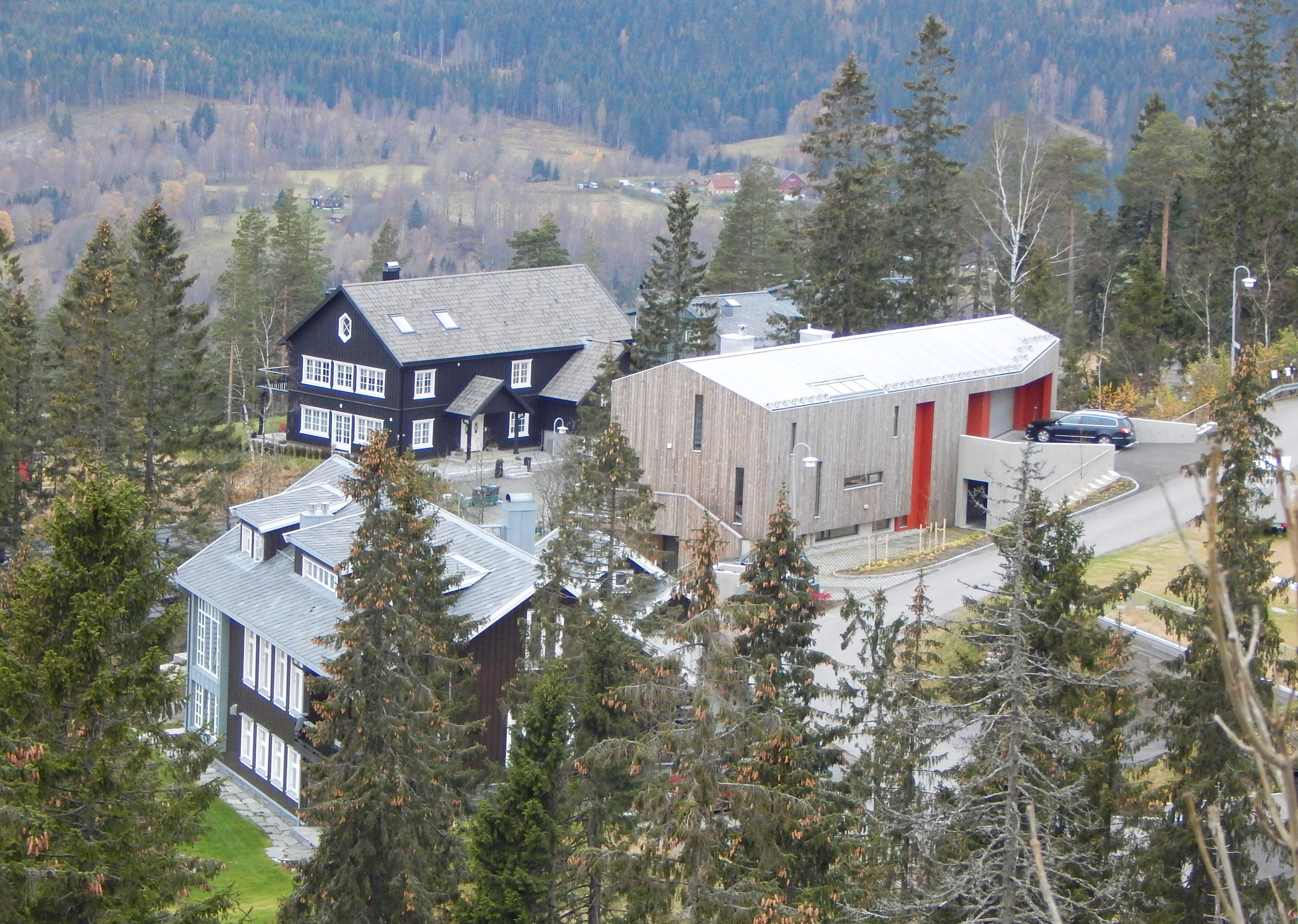 Orreskogen nr. 15 (grått bygg) og 17 (til venstre)